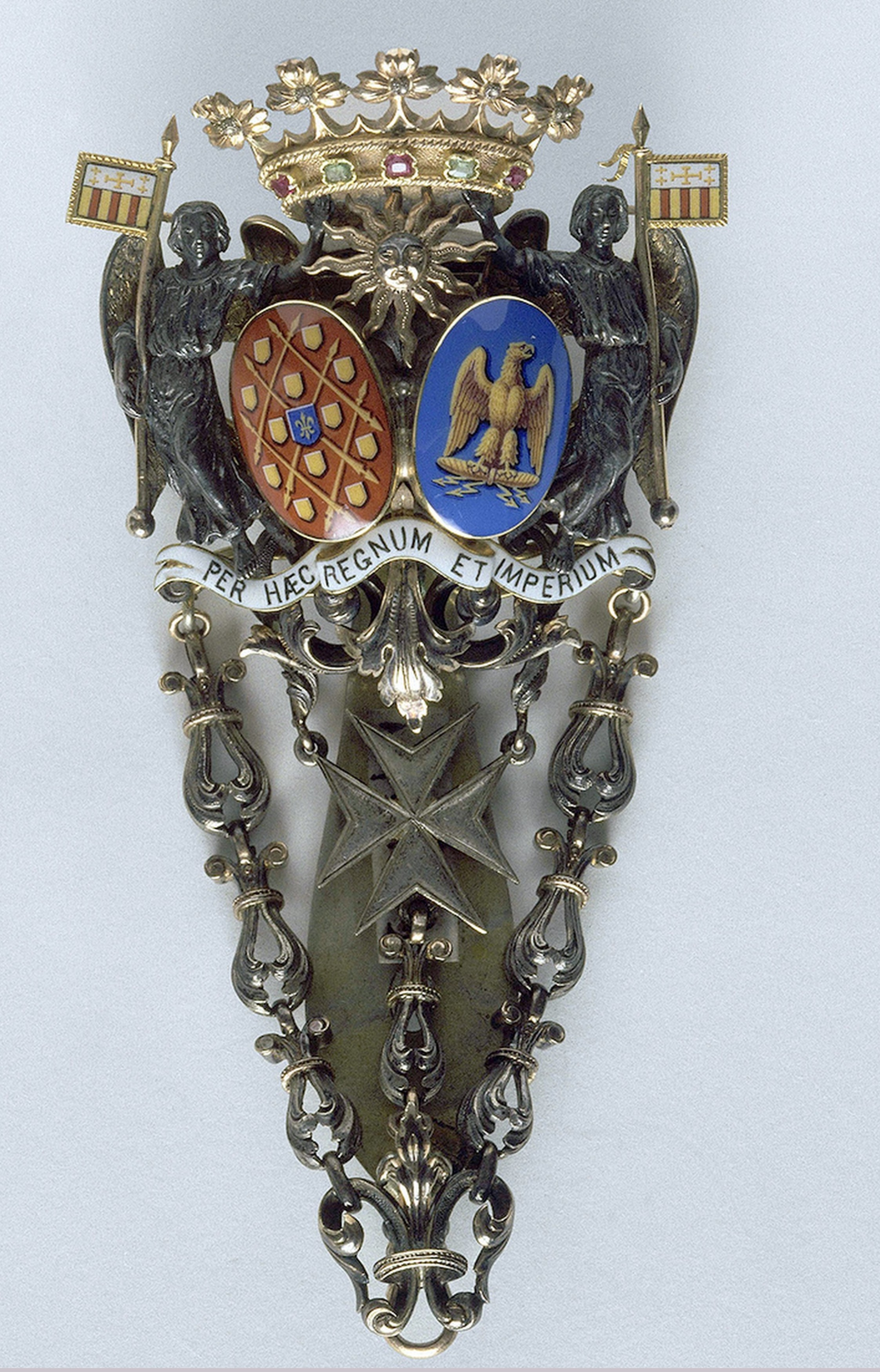 armes